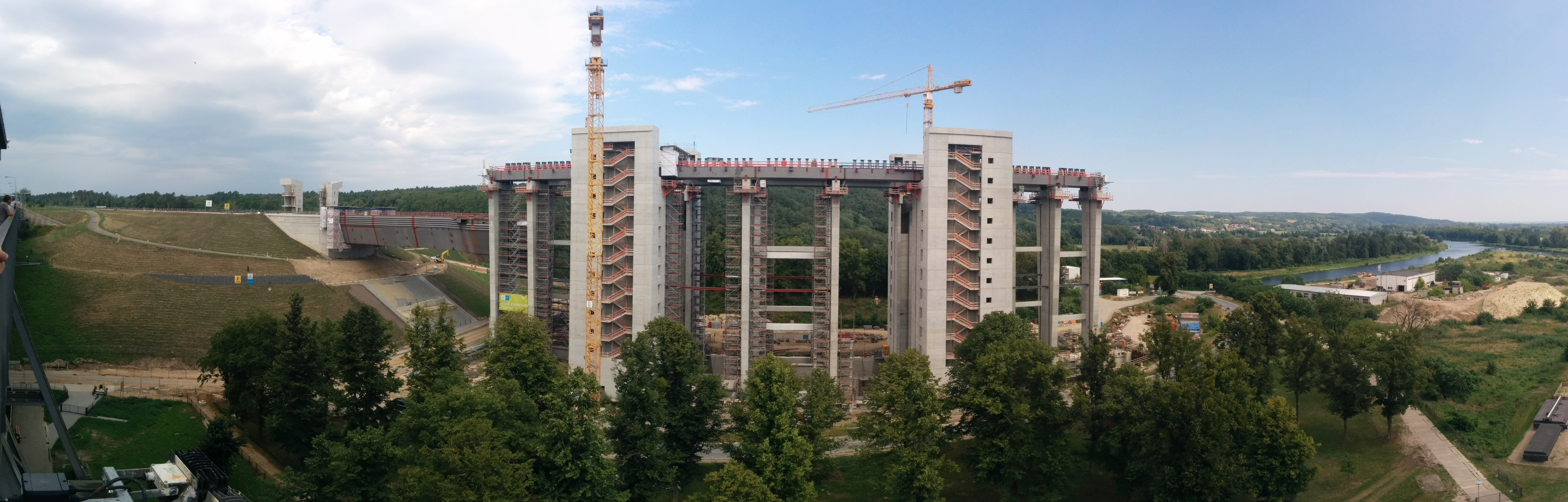 Baustelle am 09.08.2014